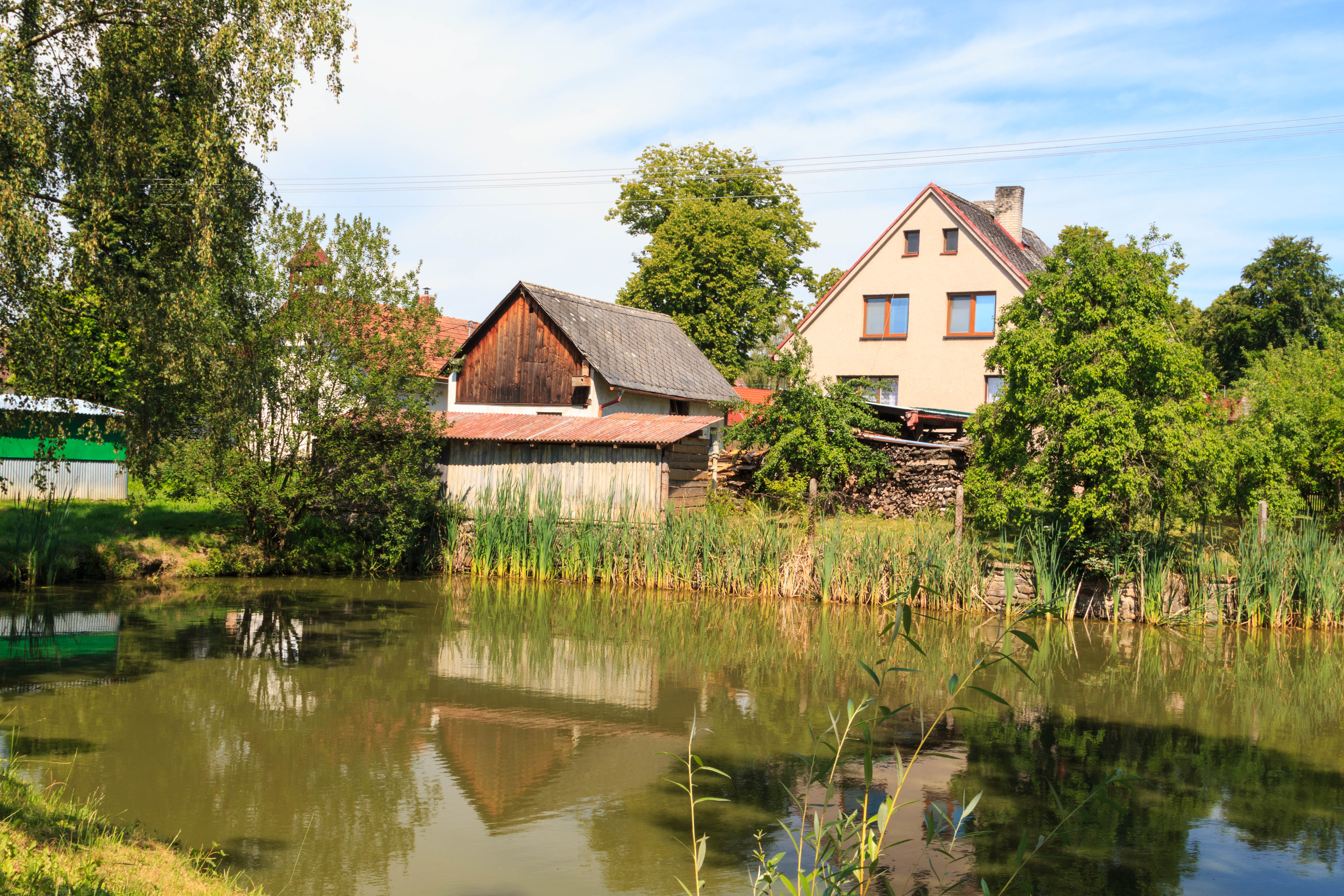 Ždírec u Havlíčkova Brodu návesní rybník